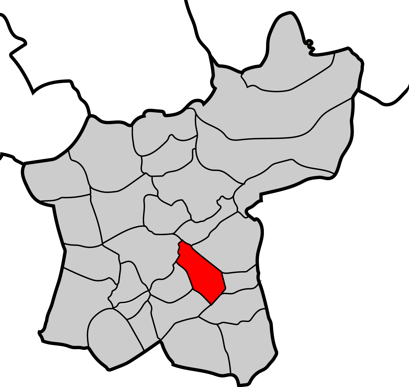 Mapa parroquia de Piñeira Baralla